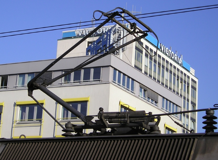 Der Einholmstromabnemher der DBAG Baureihe 143.